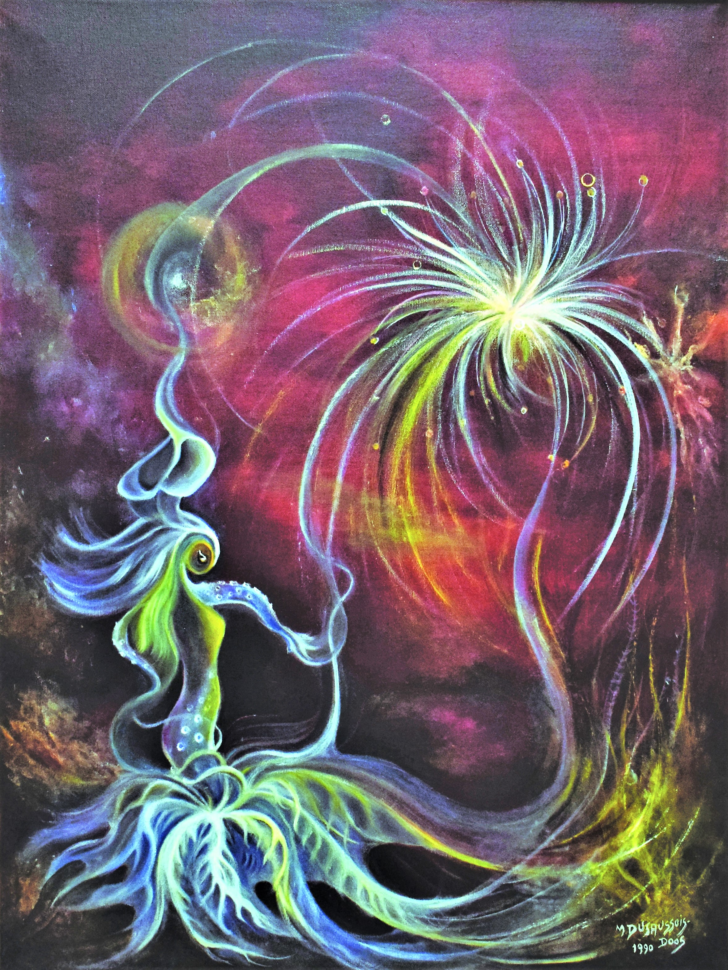 Ce tableau est un exemple d'œuvre commune réalisée par le couple Dusaussois - Doos